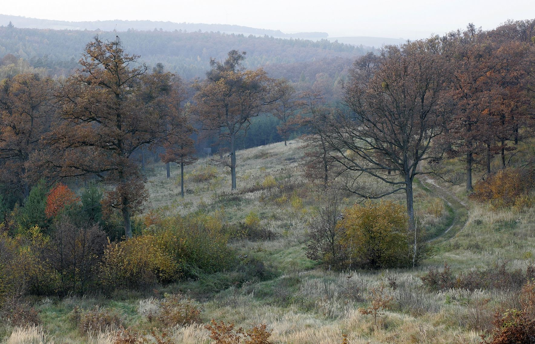 Ernstbrunner-Wald2